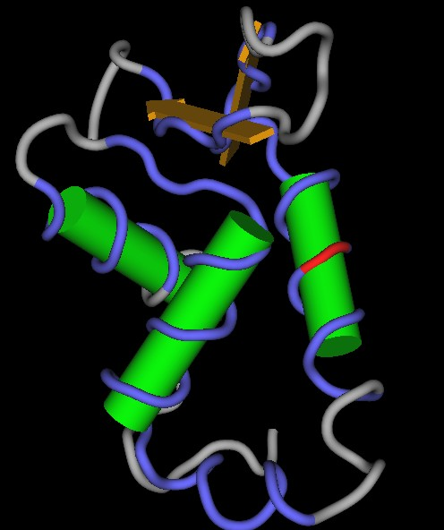 gen Foxp2